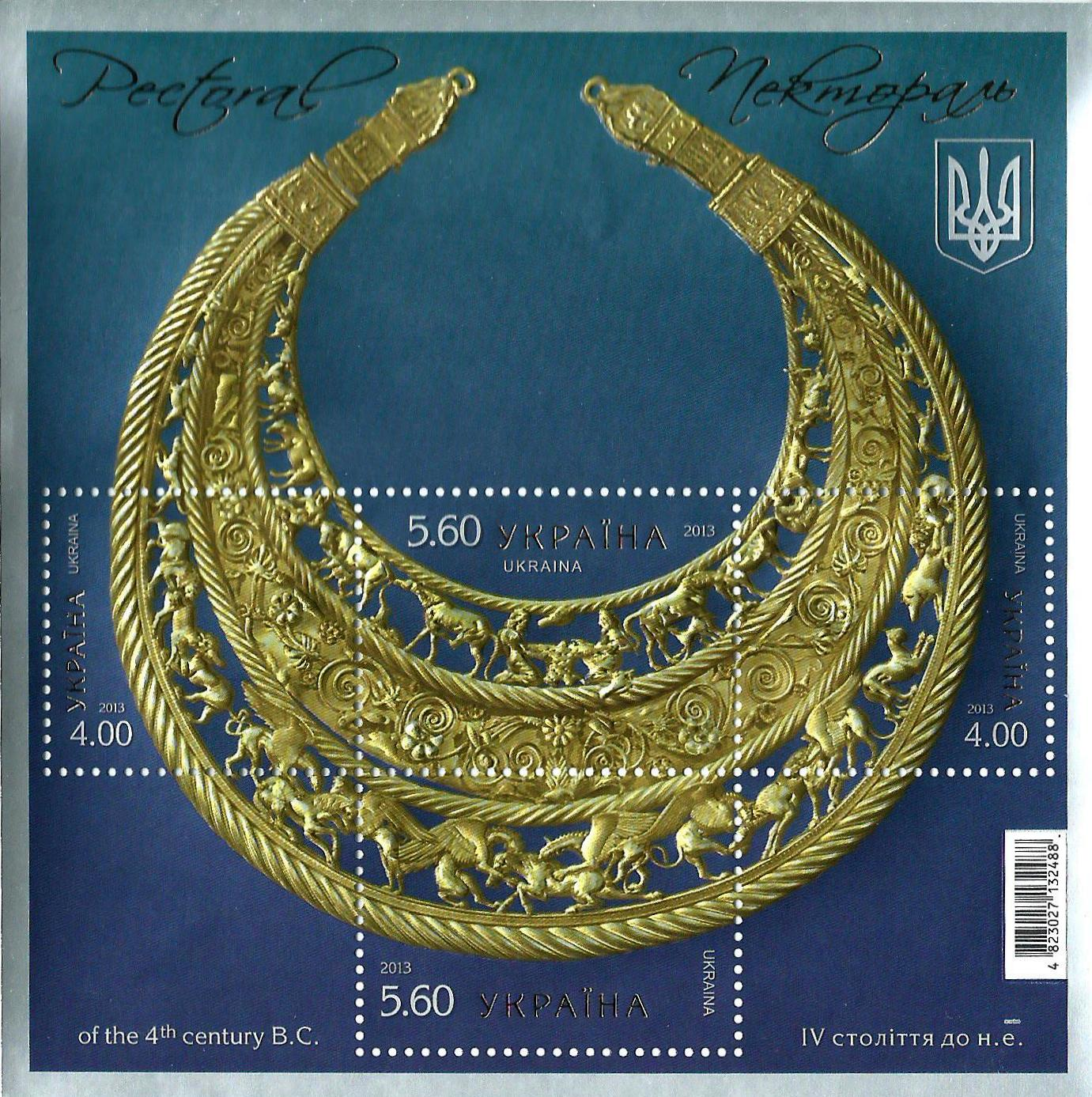 Pectoral scythe de Tovsta Mohyla (Ukraine, 4e siècle av. J.-C.). Série de timbres ukrainiens, 2013.